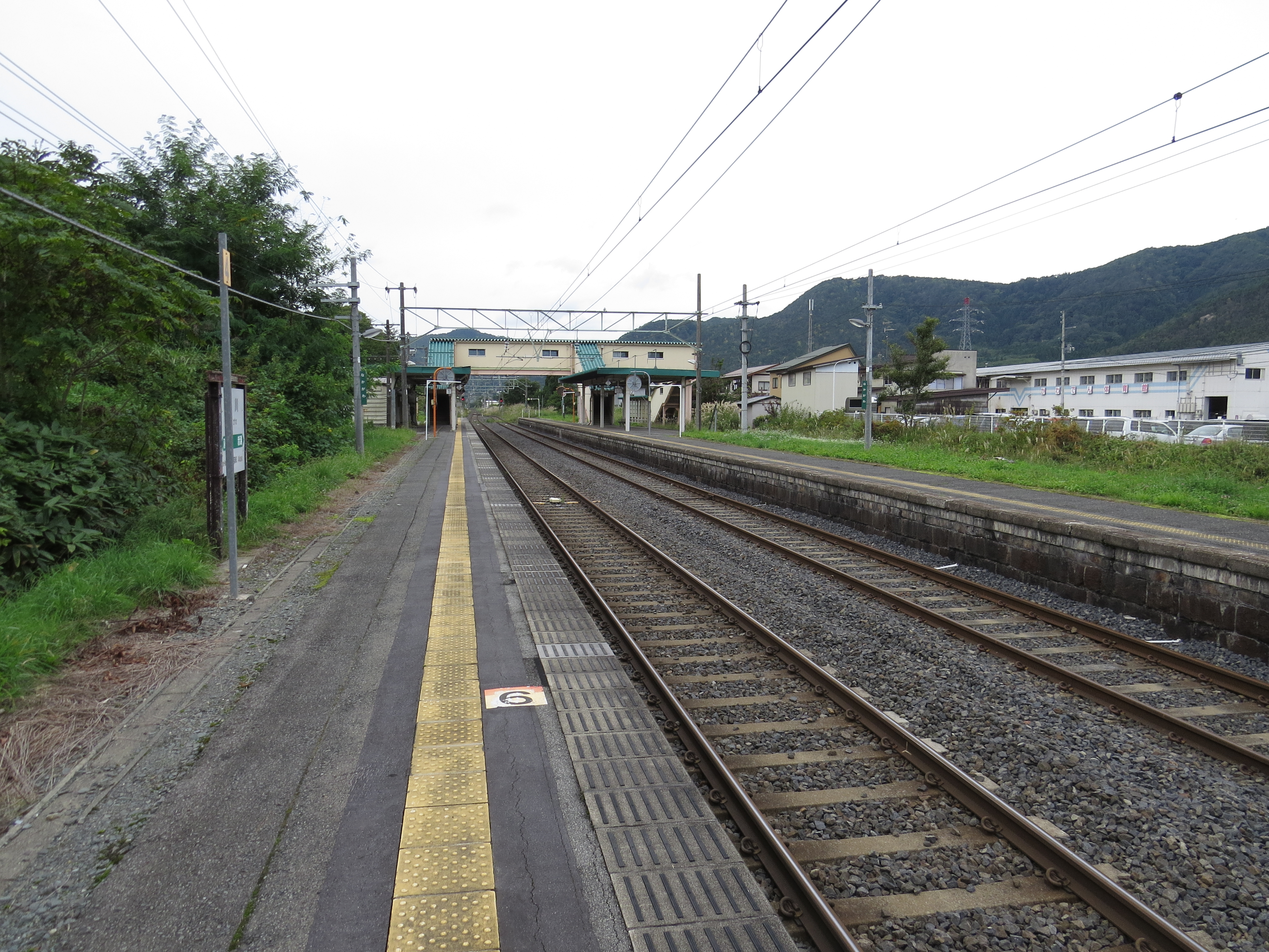 JR東日本 中川駅 駅構内